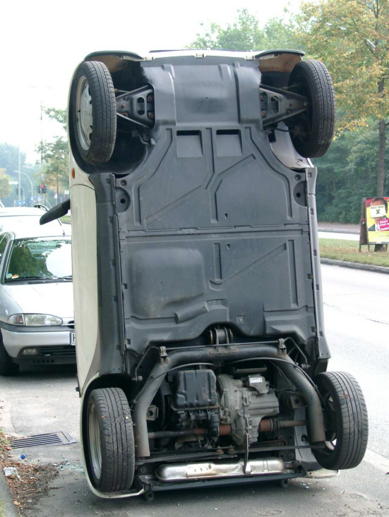 So sieht ein Smart von unten aus, selbst aufgenommen an der Hamburger Alster.